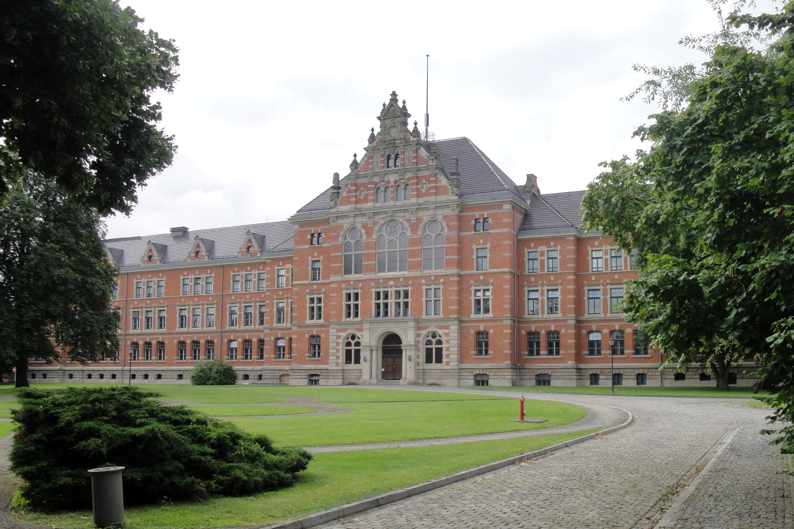 Kadettenanstalt, Bundessprachenamt, Außenstelle Naumburg und Bundeswehrfachschule Naumburg (Saale)